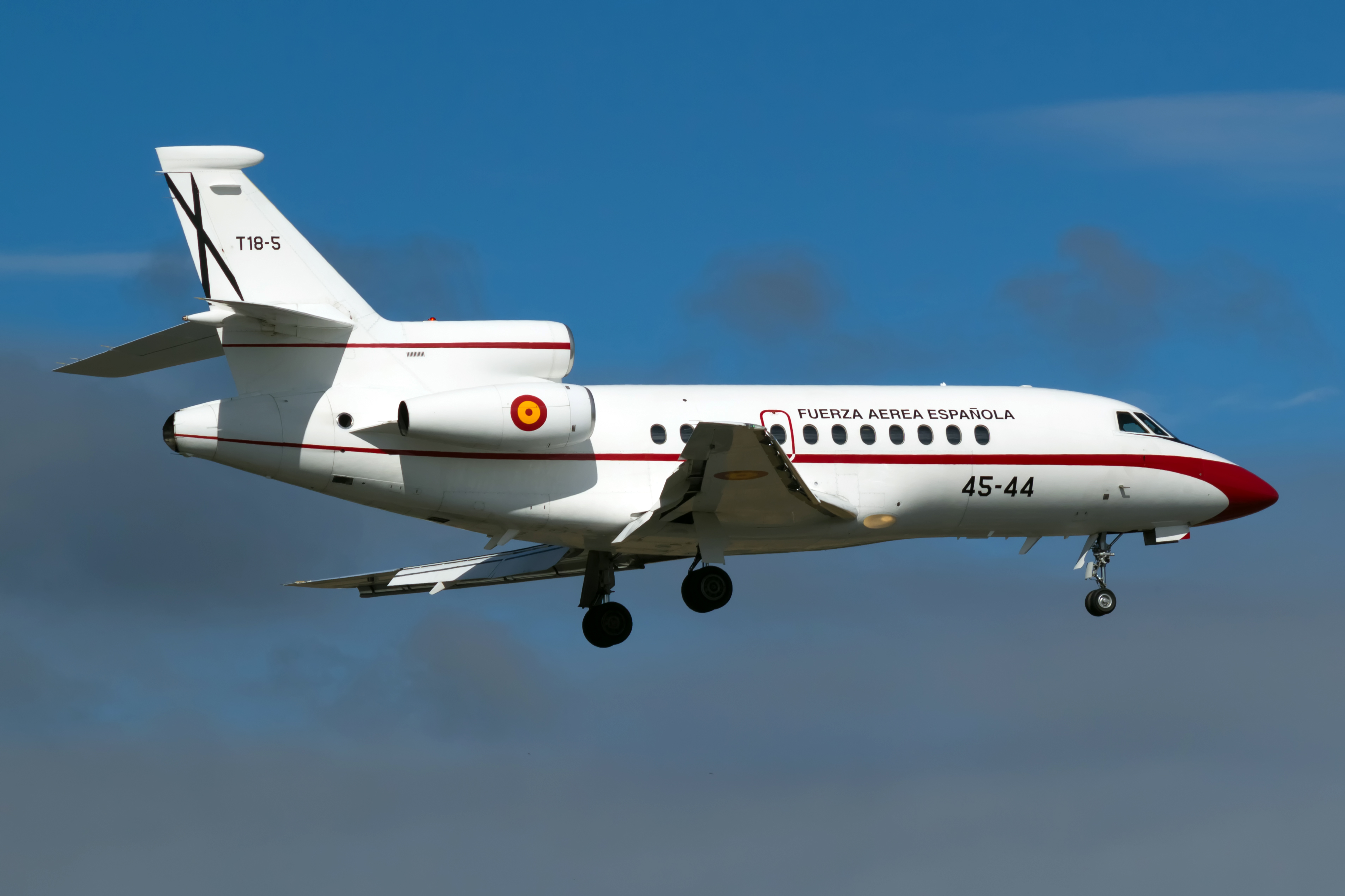 Dassault Falcon 900B da Forza Aérea Española cos reis de España no seu interior aterrando no aeroporto de Santiago de Compostela.